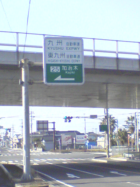 Kajiki IC kajiki-cho AIRA-city KAGOSHIMA JAPAN